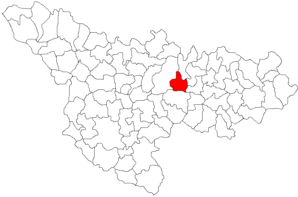 Categorie:Hărţi ale judeţului Timiş